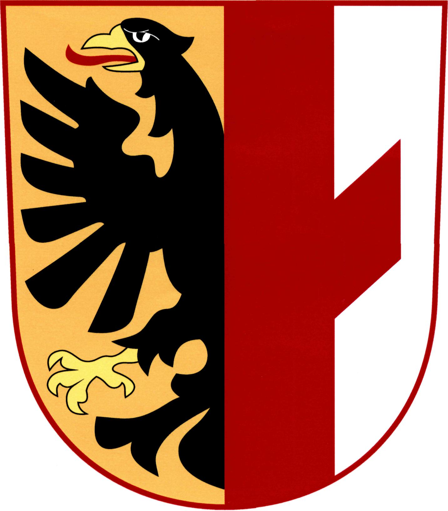 Znak obce Čakovičky